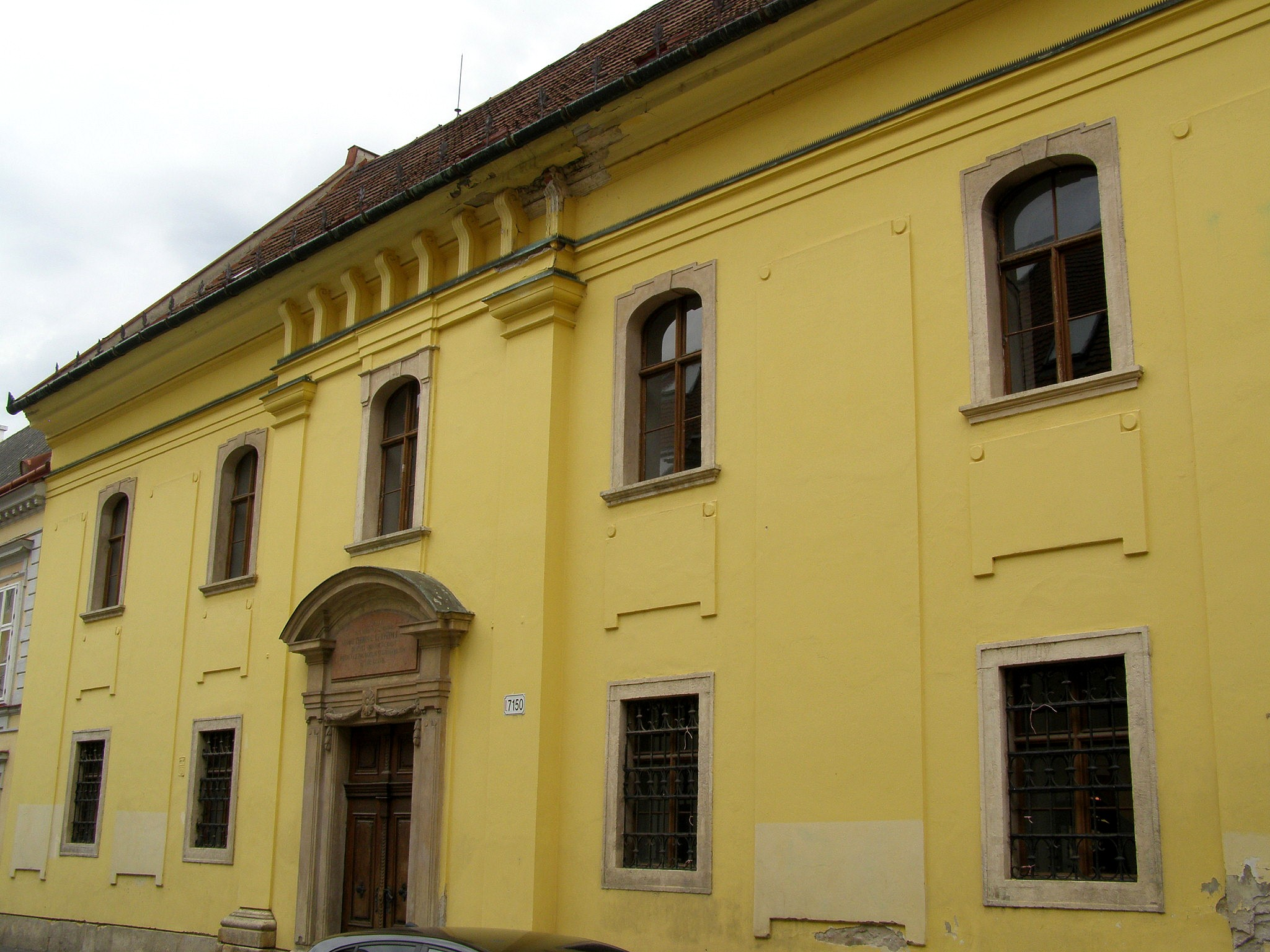 Malý evanjelický kostol na Panenskej ulici v Bratislave. Kostol pre slovensko-maďarských evanjelikov postavili v roku 1777 na mieste zbúraného nemeckého artikulárneho dreveného kostola so súhlasom Márie Terézie, ktorá dovolila po tzv. Veľkom kostole postaviť aj druhý (Malý) kostol. Podľa projektov Mateja Walcha stavbu zrealizoval František Römisch